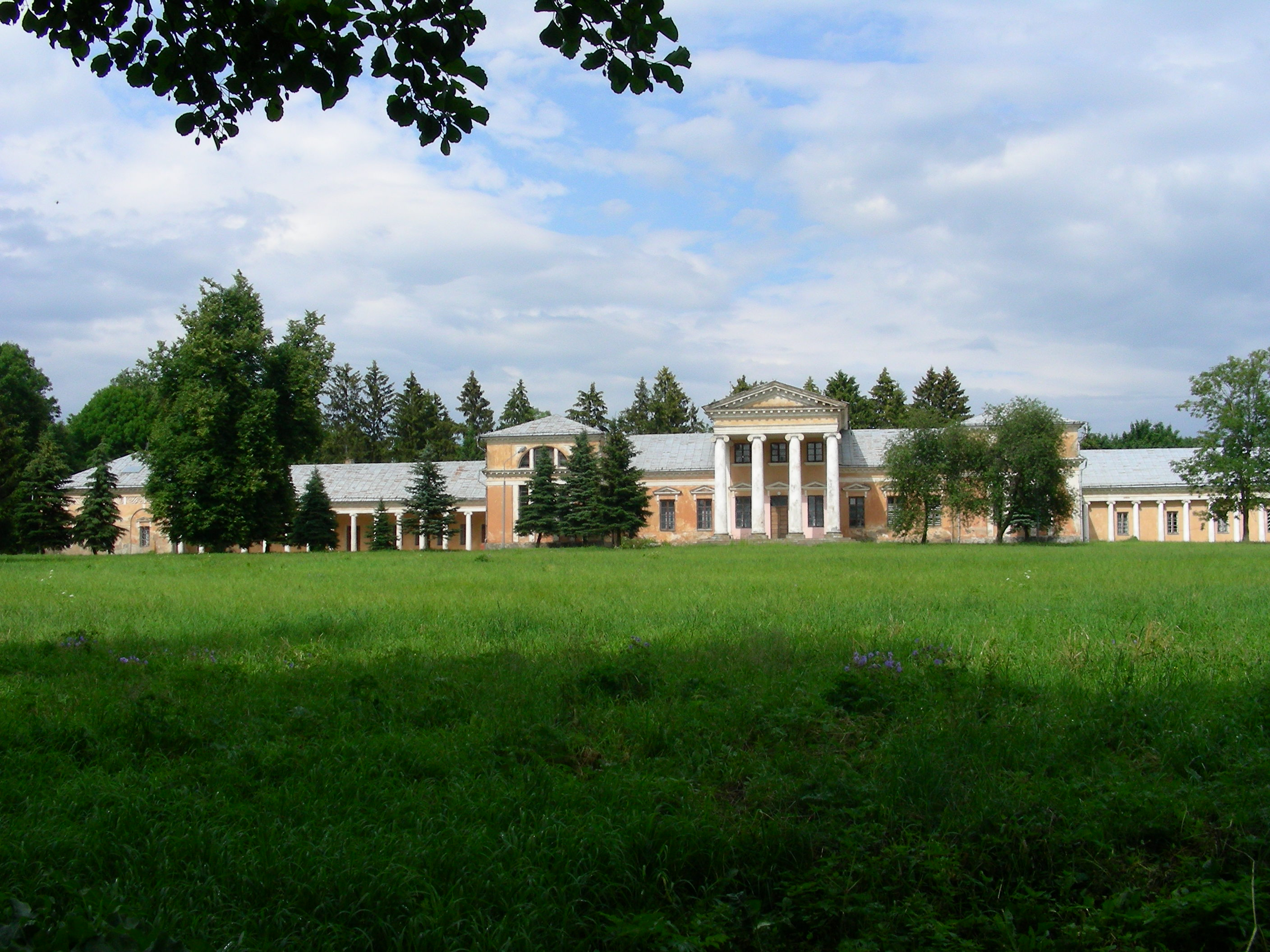 Беларуская (тарашкевіца): Былы палацава-паркавы ансамбль:палацпарк. в. Сноў This is a photo of Belarusian heritage monument. Reference number: 612Г000500 ( WLM)